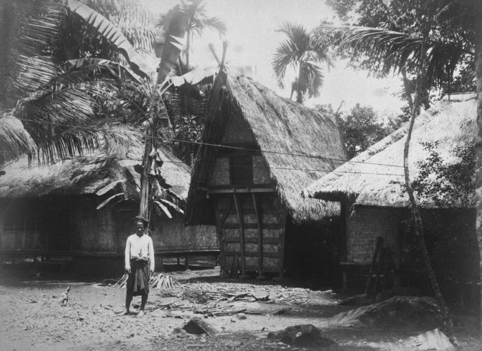 Foto. Dorpsgezicht, Indihiang